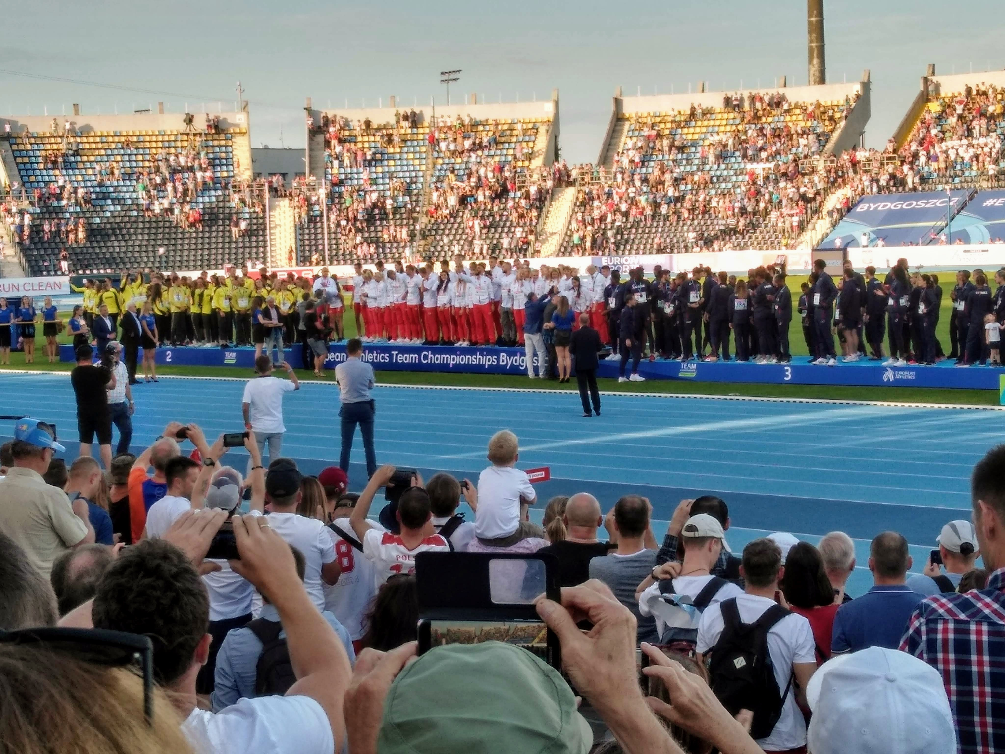 Podium Drużynowych Mistrzostw Europy w Lekkoatletyce 2019